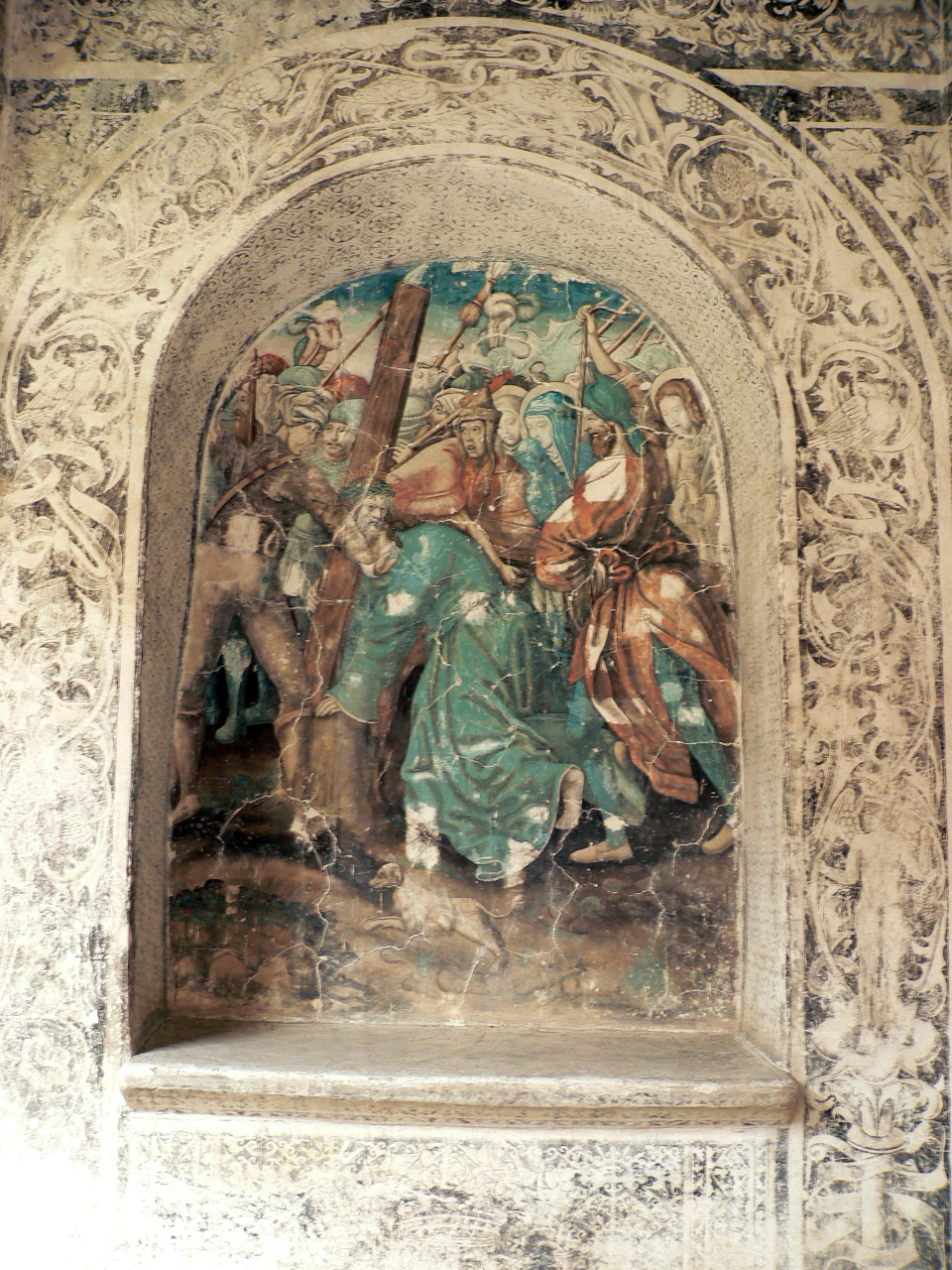 Detalle de pintura en el Ex Convento de San Andrés Apóstol